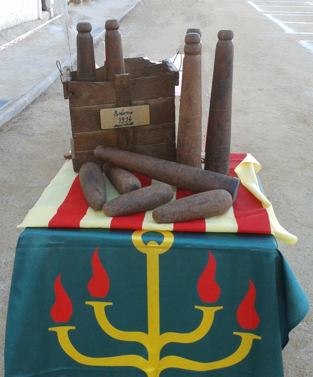 Bitlles i bitllots catalans de l´any 1914. Salomó (Tarragona).